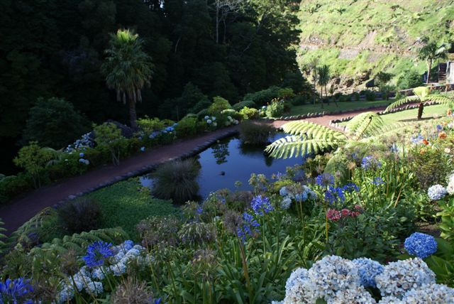 Parque Natural da Ribeira dos Caldeirões, vegetação, Nordeste, ilha de São Miguel, Açores